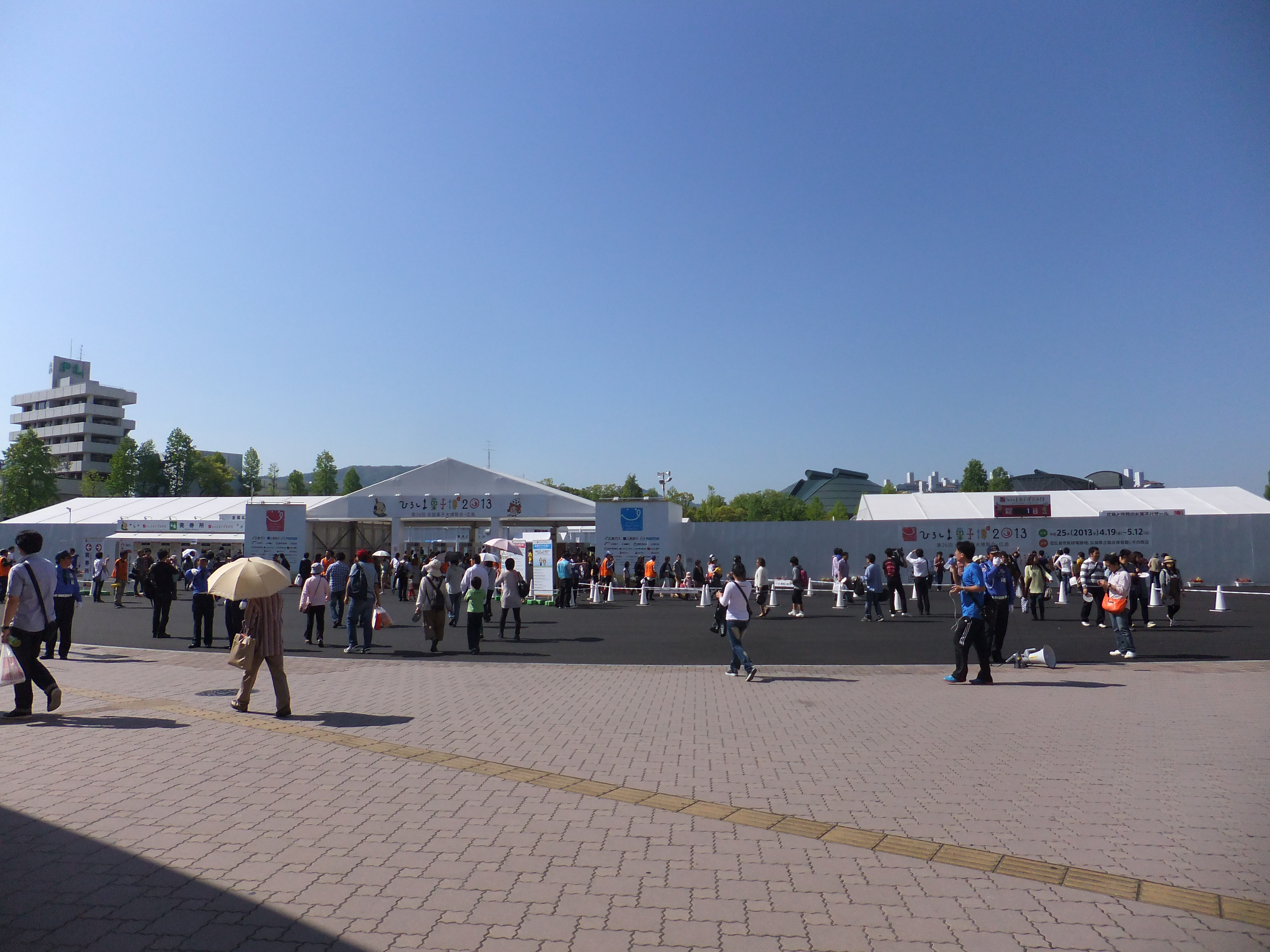 ひろしま菓子博2013